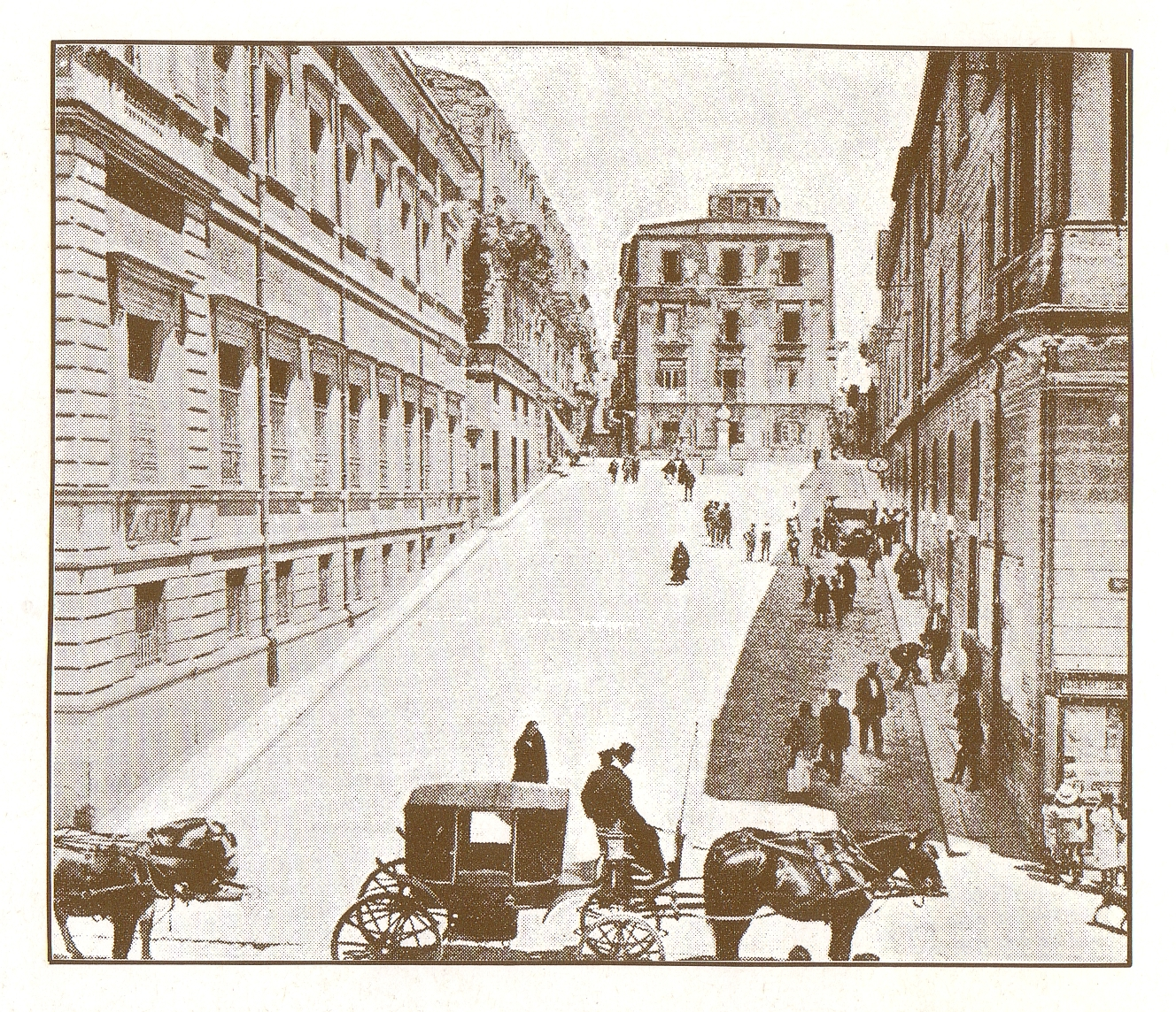 Salita Tribunali poi Via Matteotti, con a sinistra l'edificio della vecchia Banca d'Italia